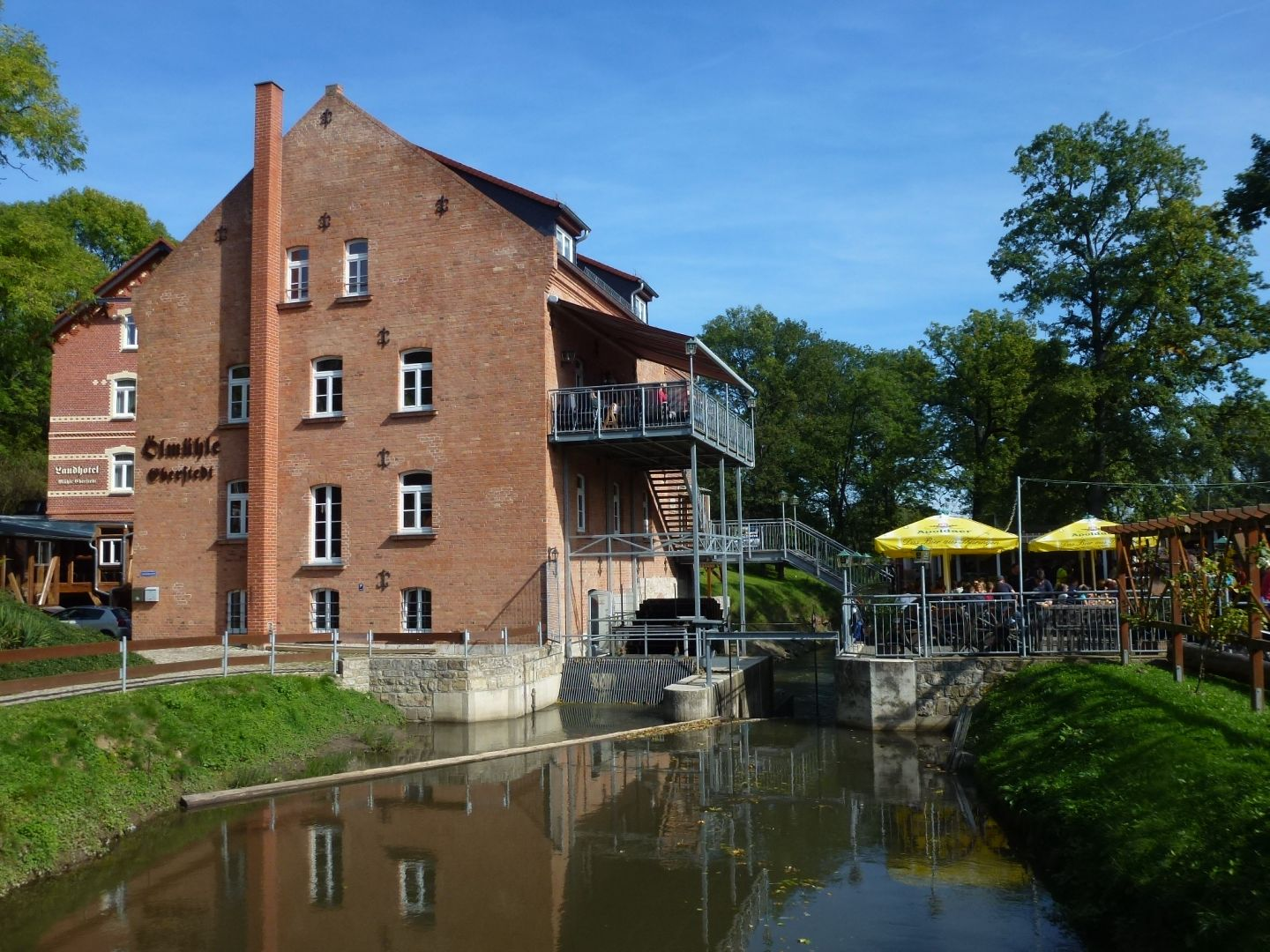 Ölmühle in Eberstadt